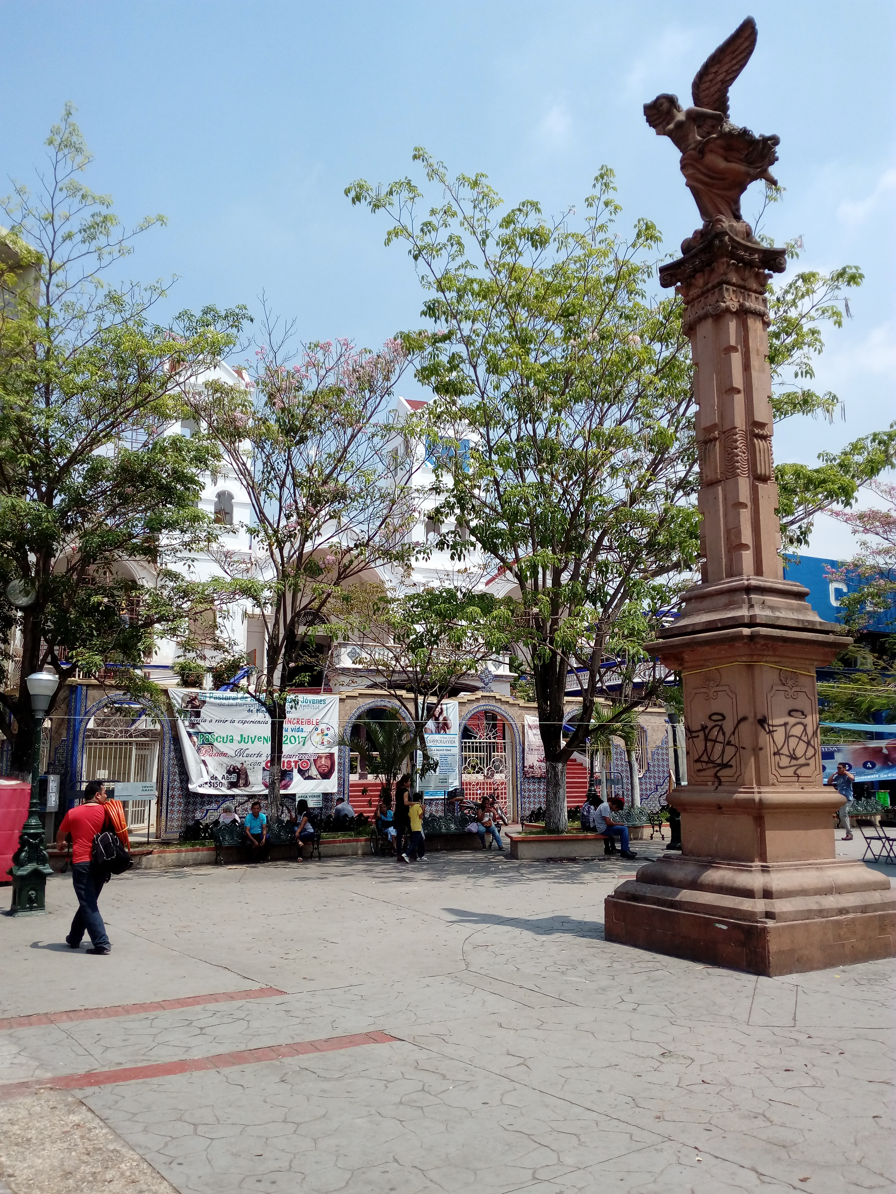 Catedral de Minatitlán